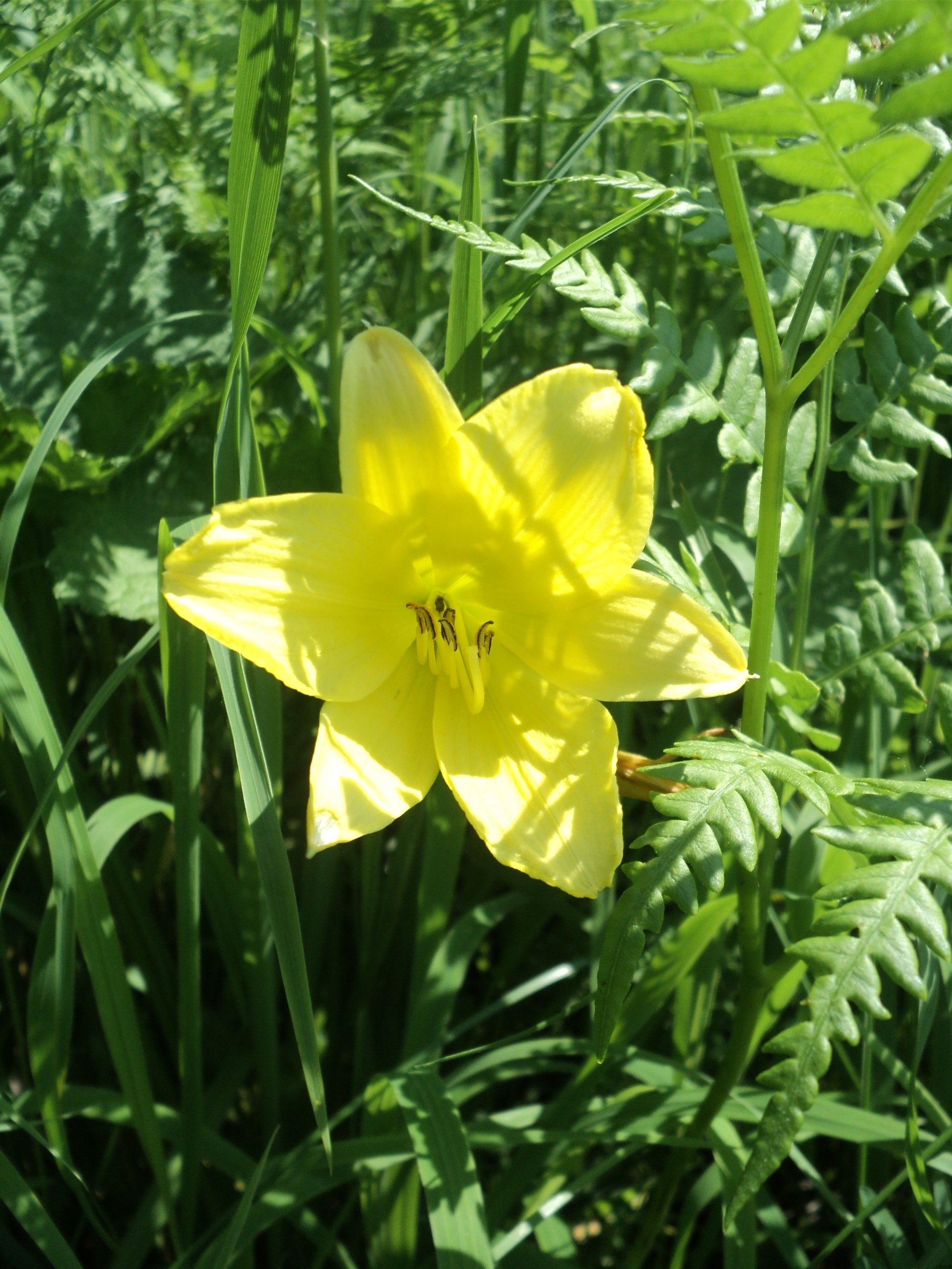 Лилия в березняке на склоне горы